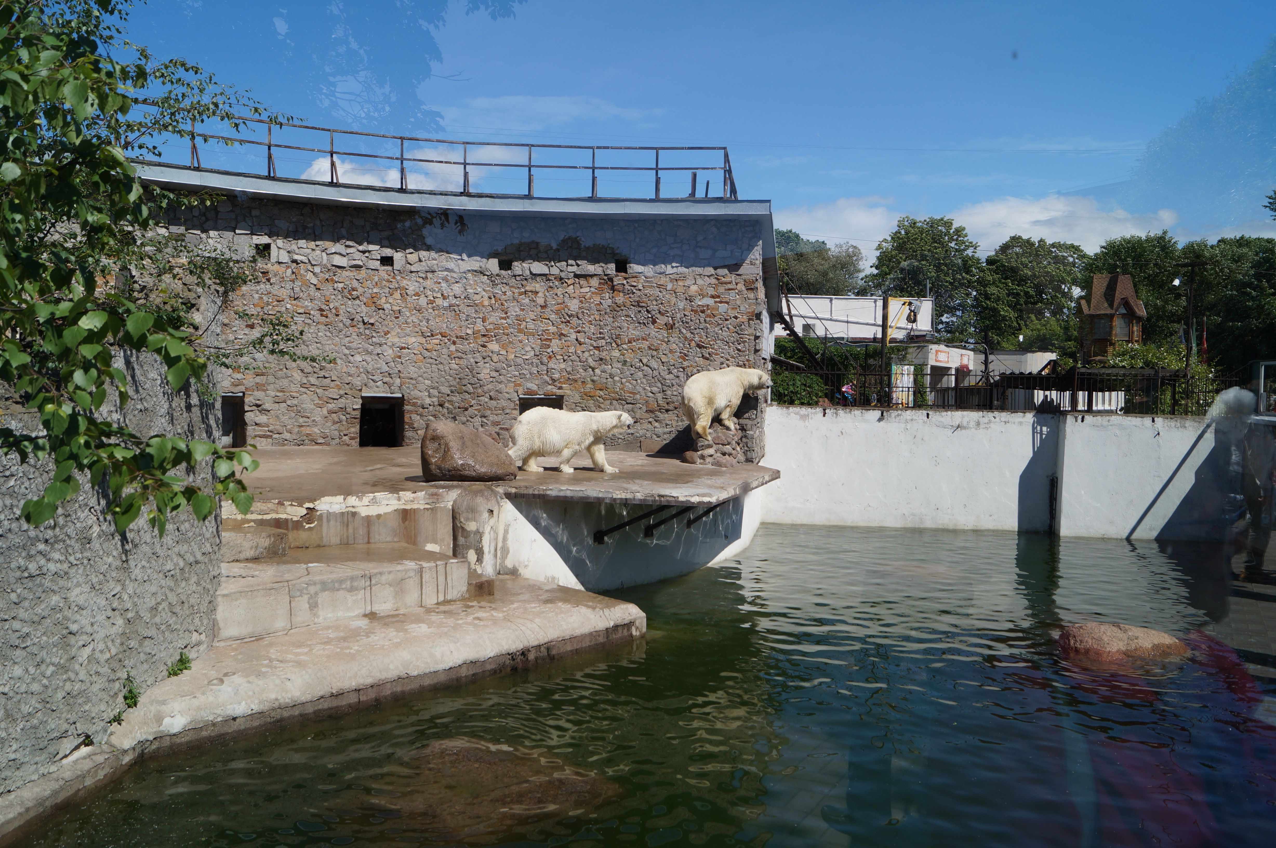 Белые медведи (Ursus maritimus)